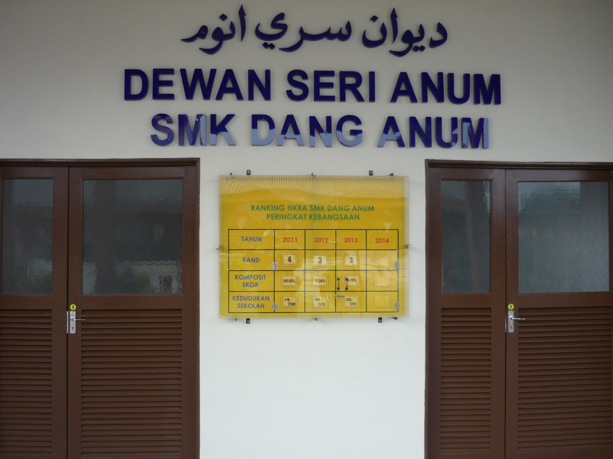 Pintu Masuk Dewan Seri Anum